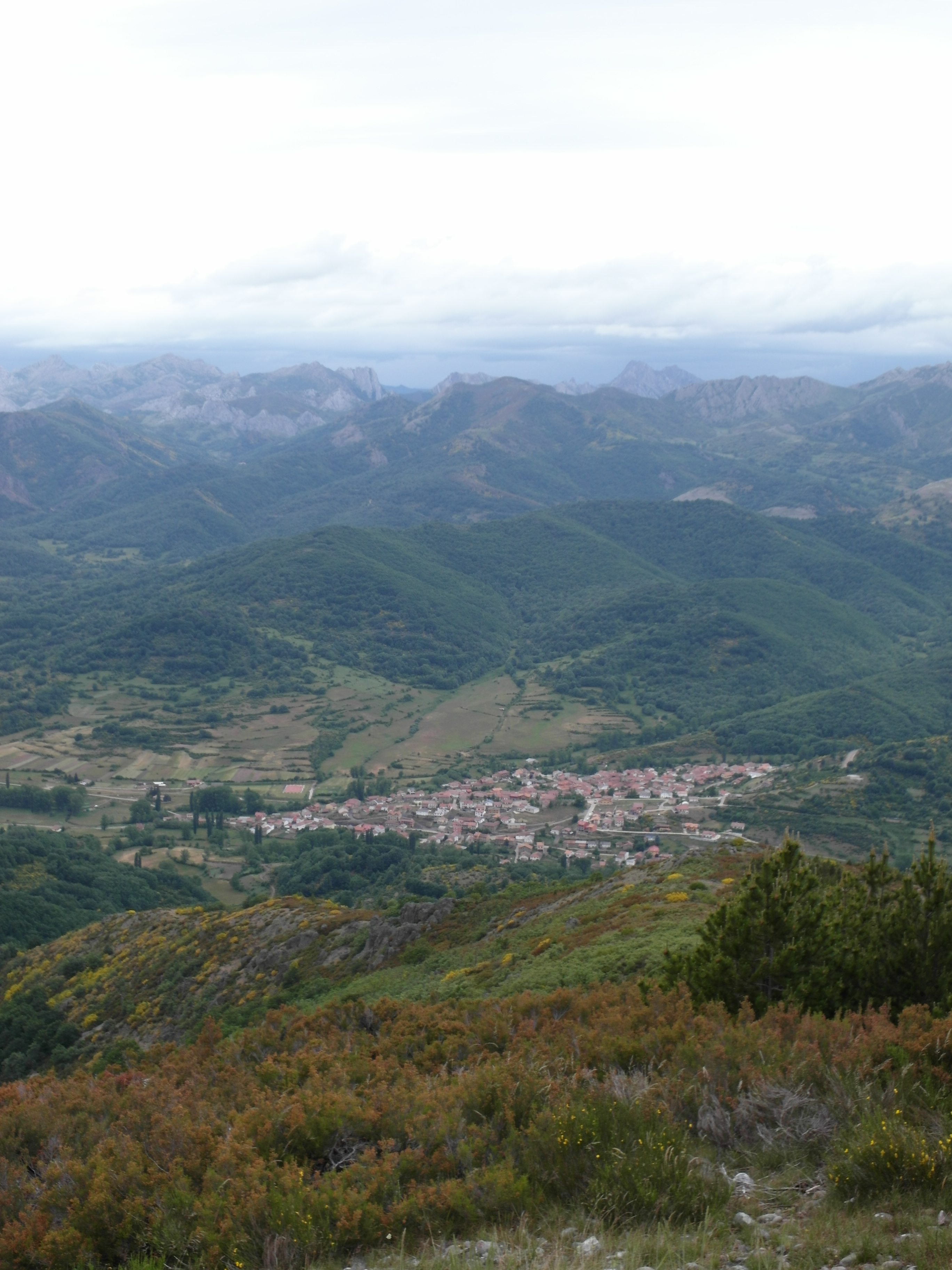 Prioro (León), visto desde la ladera del cueto Prioro.